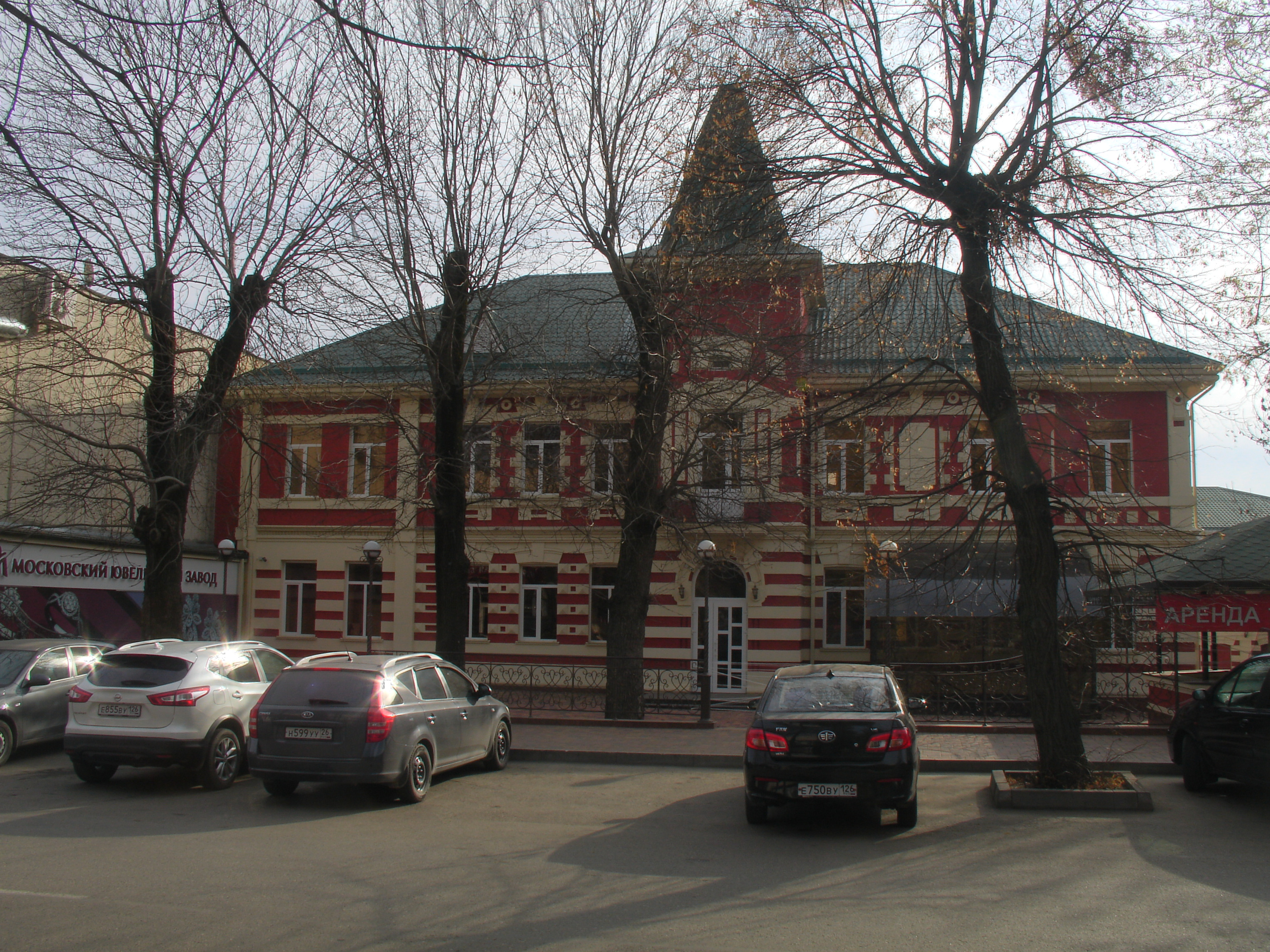 Электро-световой диагностический, терапевтический институт доктора М.С. Зернова: улица Кисловодская, 3, Ессентуки, Ставропольский край